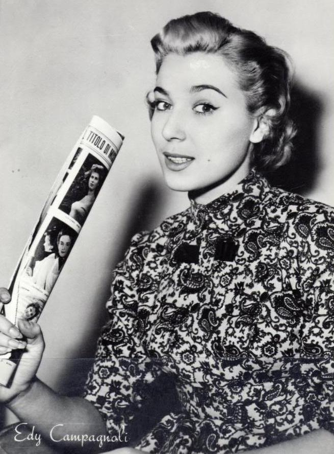 photo fromCartolina anni '50